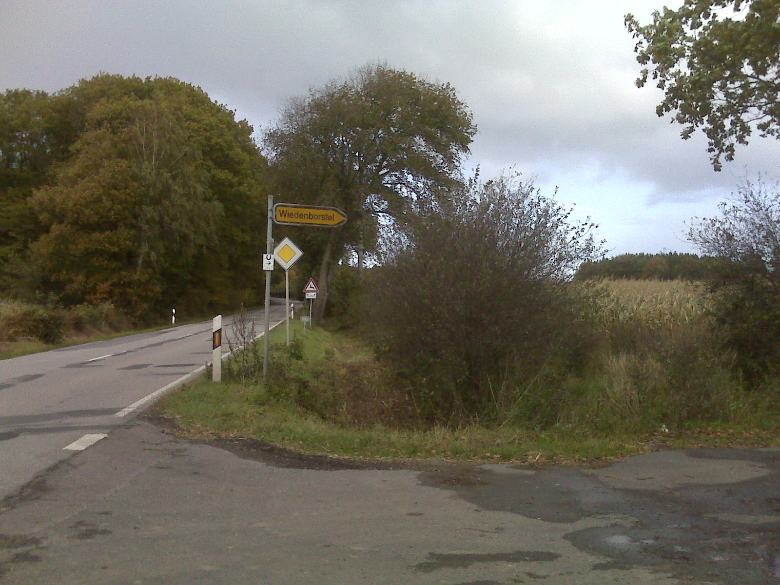 Abfahrt von der L121 nach Wiedenborstel